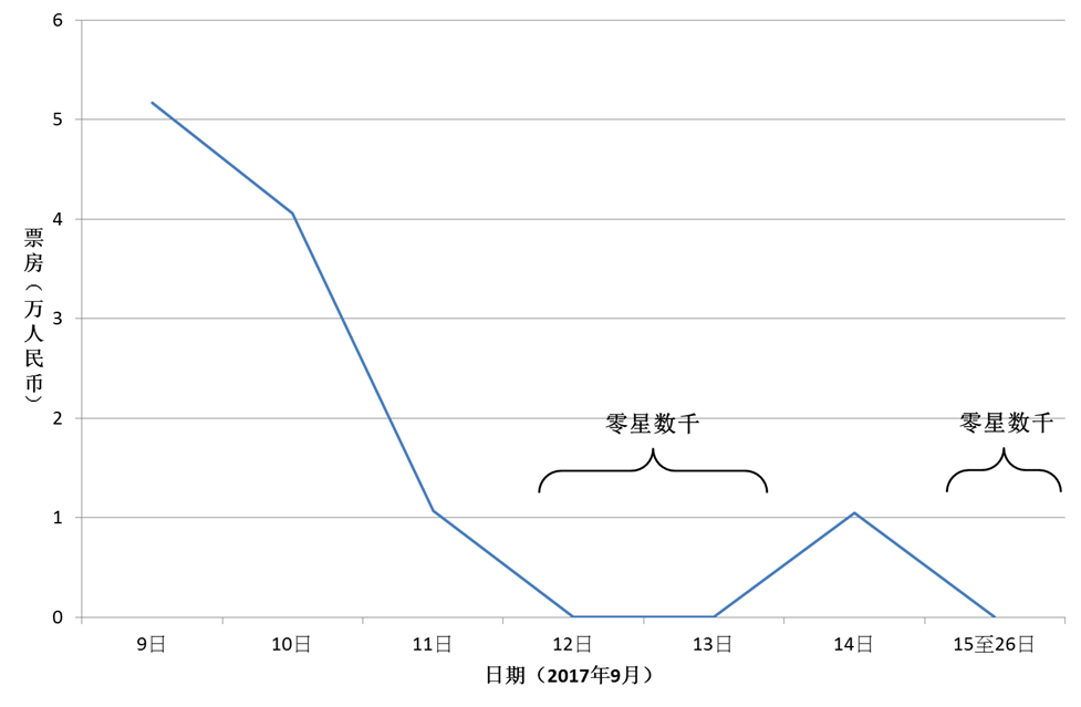 《纯洁心灵·逐梦演艺圈》第二次上映期间的票房